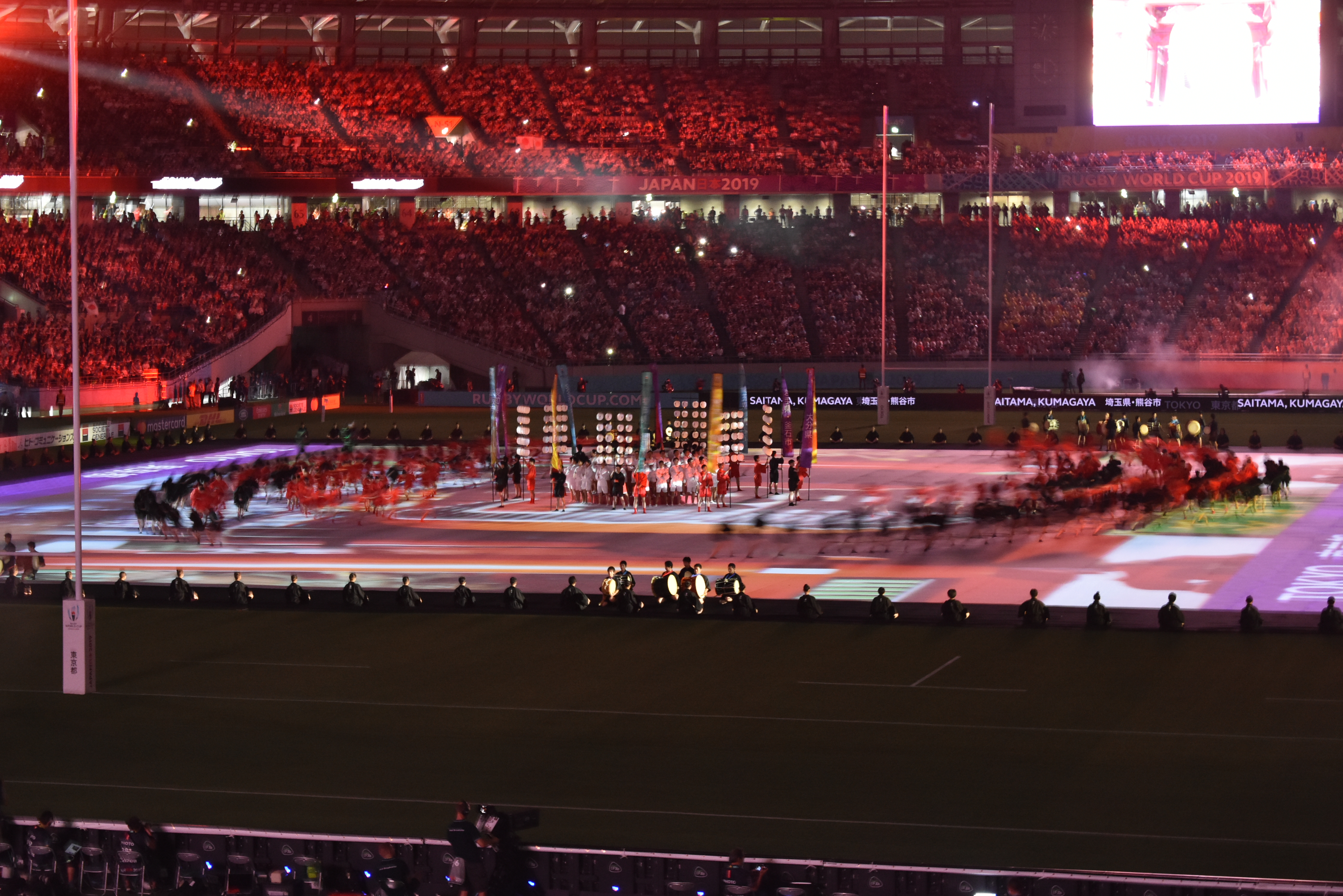 ラグビーワールカップ2019